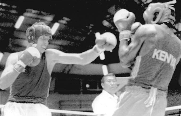 Andreas Zülow, Patrick Waweru ADN-ZB AP-Tele-16.4.89 Thailand: Boxen-Kings-Cup in Bankok-Olympiasieger Andreas Zülow aus der DDR (l.) bezwang beim Finale im Leichtgewicht den Weltcupdritten Patrick Waweru aus Kenia.